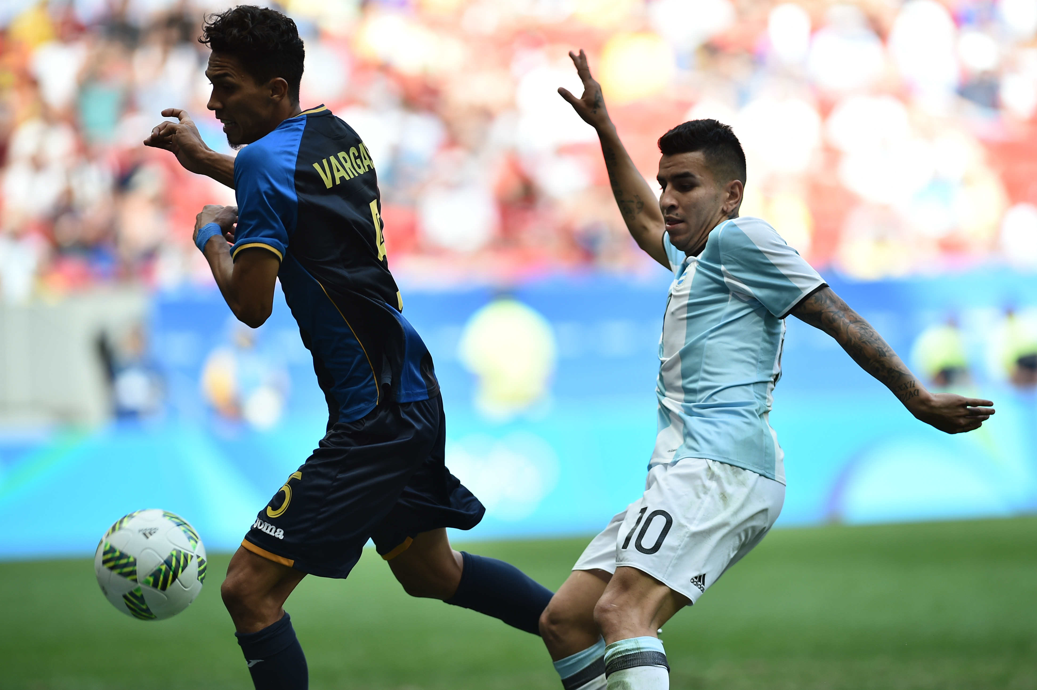 Estádio Nacional de Brasília Mané Garrincha, Brasília, DF, Brasil, 10/8/2016 Foto: Andre Borges/Agência Brasília Argentina e Honduras empataram por 1x1 nesta quarta-feira (10), no Estádio Mané Garrincha, em partida pelo grupo D do futebol masculino nas Olimpíadas 2016. O placar classificou Honduras para a próxima fase da competição e tirou a seleção argentina masculina da Olimpíada. Partido entre Argentina y Honduras por fase de grupos.